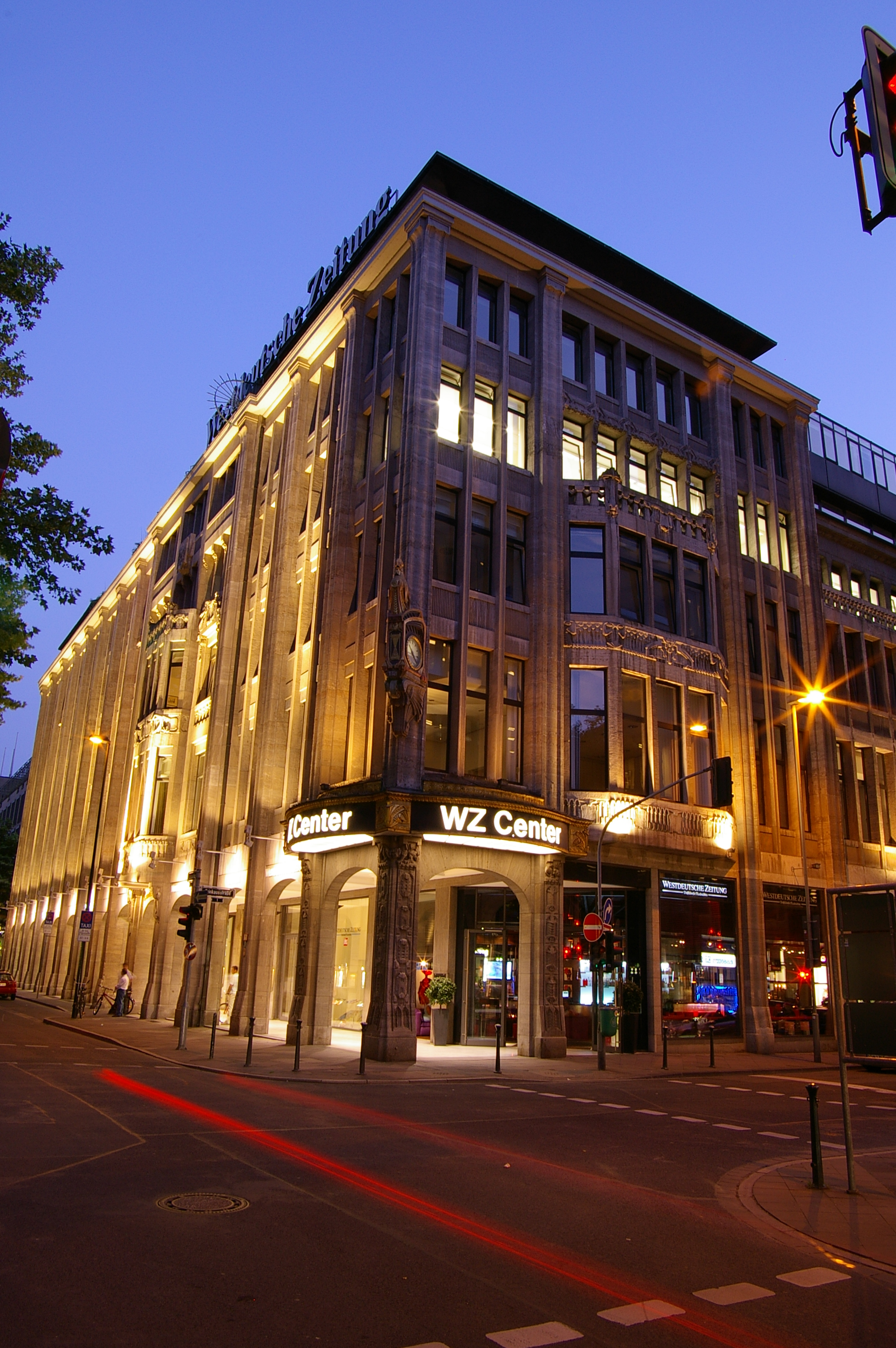 Genehmigung: GFDL (Version 1.2, November 2002), kein wie auch immer geartetes "Gentlemen-Agreement". Bildnutzung ohne Einhaltung der Bestimmungen der GFDL ist kostenpflichtig und wird vom Rechteinhaber in Rechnung gestellt. Zweitlizensierung ggf. auch unentgeltlich auf Anfrage. Es gelten die AGB. Motiv: An der Düsseldorfer Kö